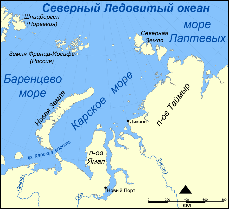 Карское море Башҡортса: Карский диңгеҙе. Рквикинан күсерелде